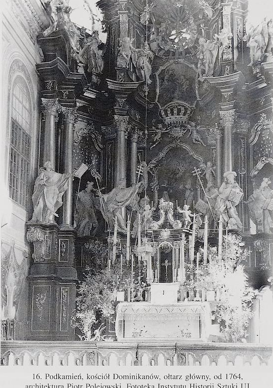 Головний вівтар, Підкамінь поблизу Бродів (знищений совітами)